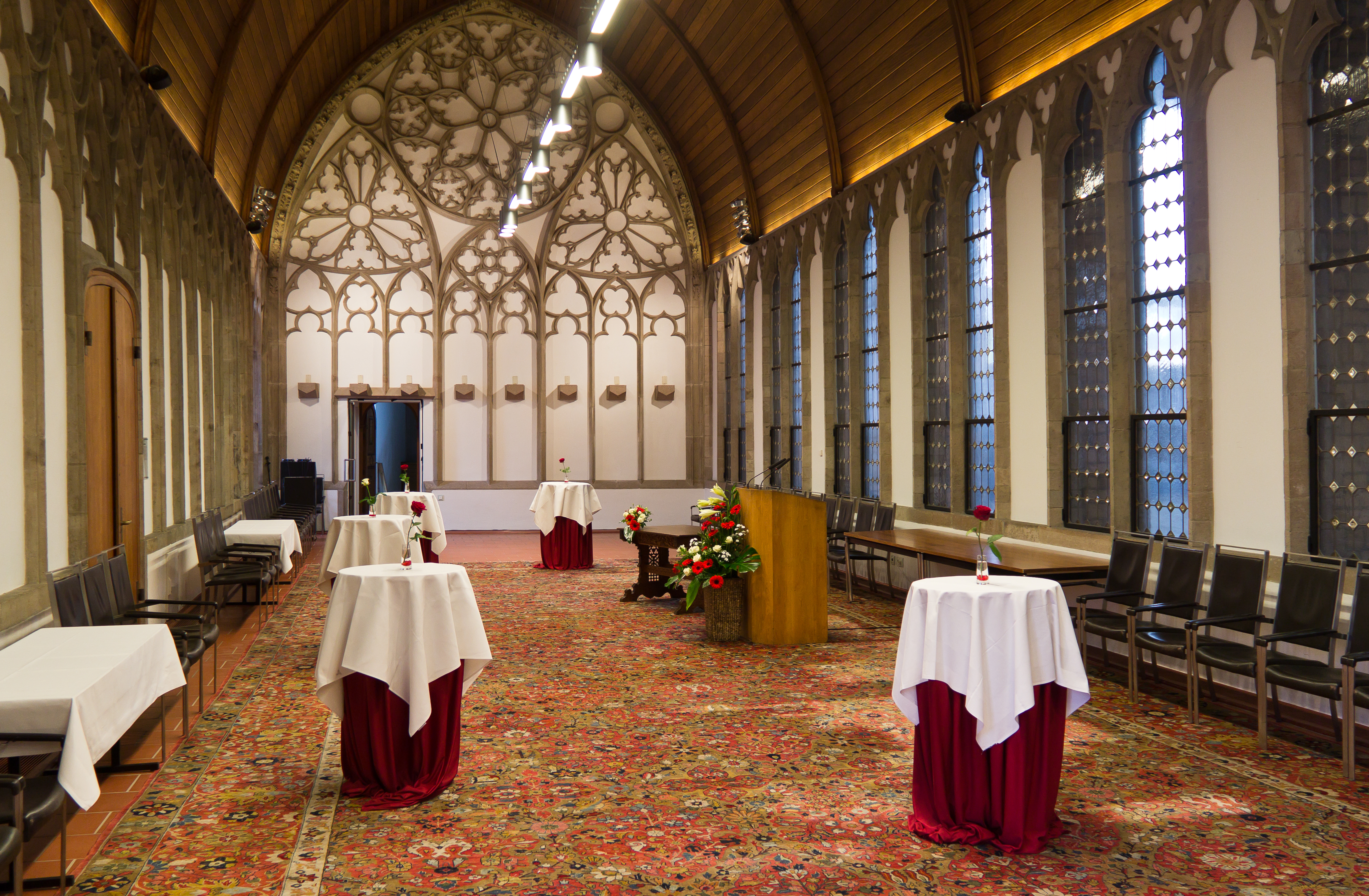 Der festlich geschmückte Hansasaal im Historischen Rathaus von Köln